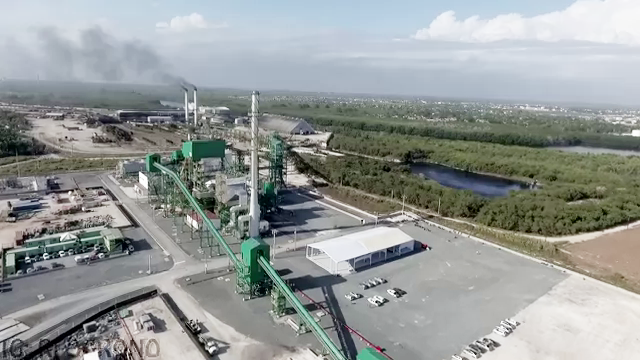 Ingenio Cristóbal Colón y Planta San Pedro Biomasa.